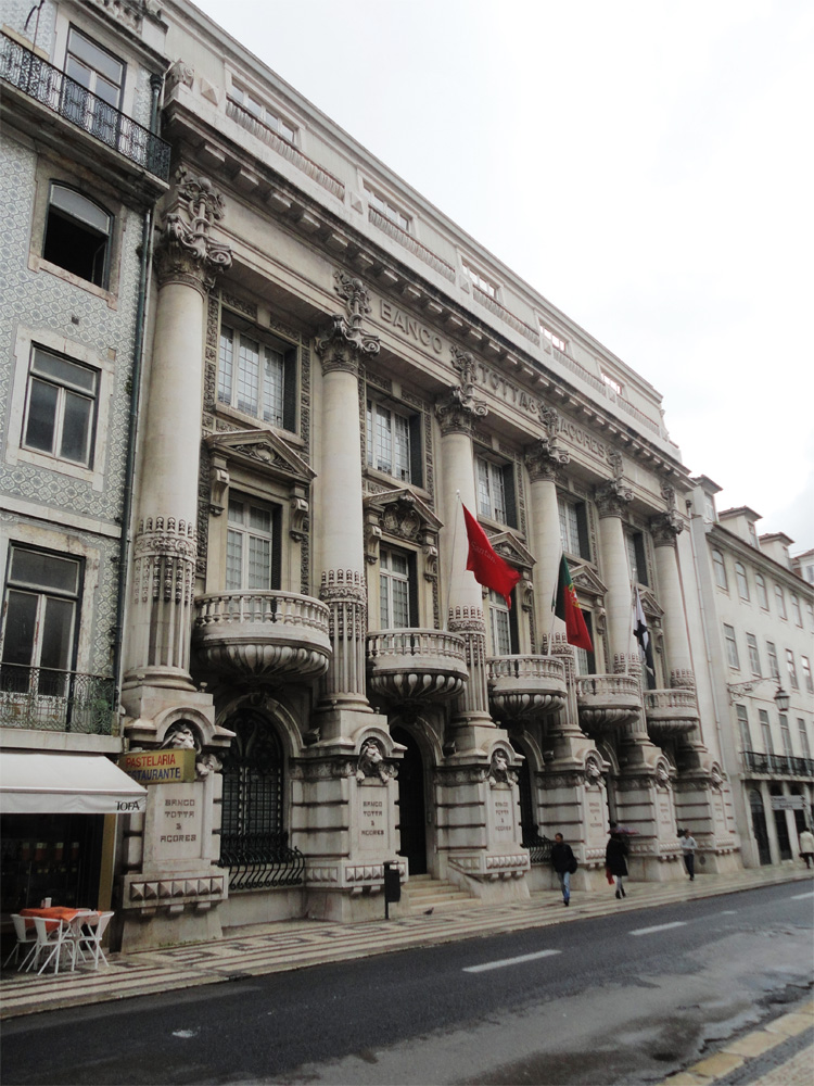 Banco Totta e Açores, Rua do Ouro, Lisboa; Arq. Ventura Terra